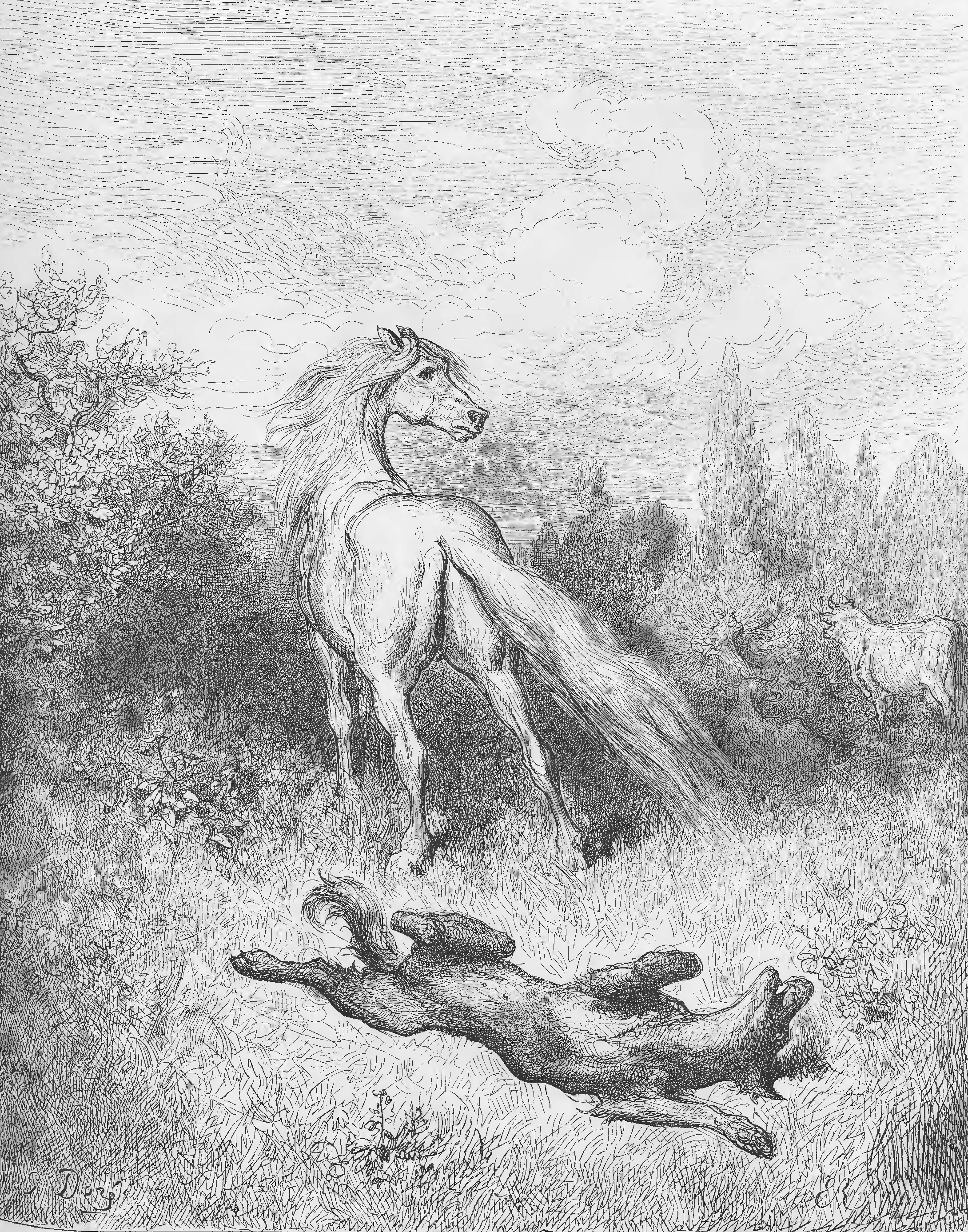 grafika z książki PL publikacja: Nakładem i drukiem Jana Noskowskiego, Warszawa 1876